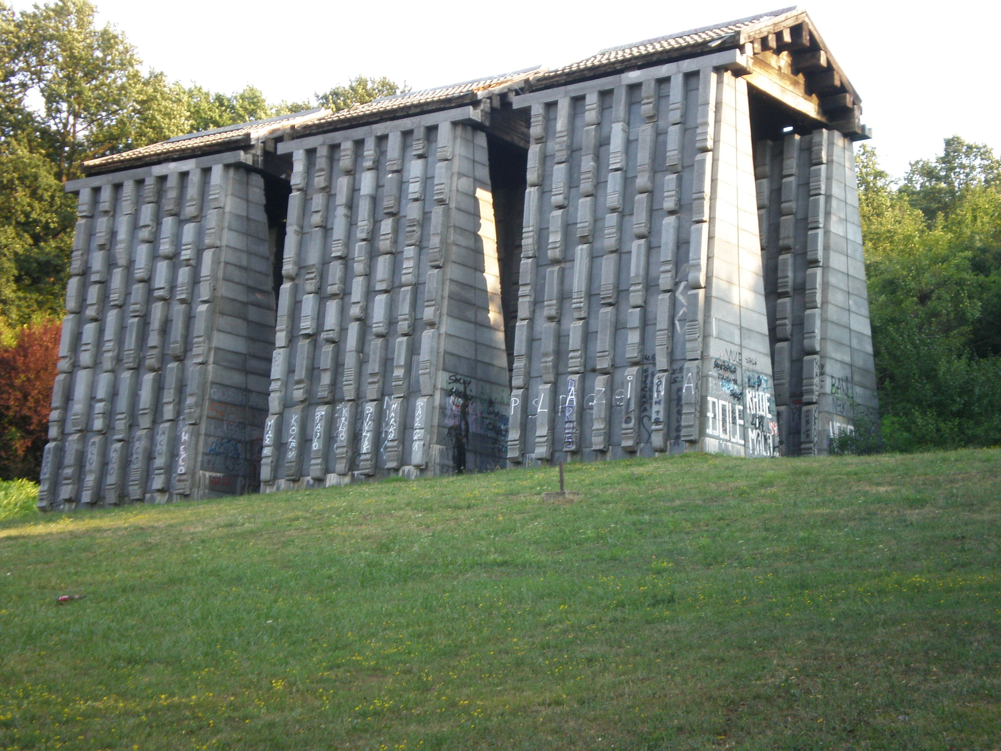 Споменик подигнут у знак сећања на цивиле и војнике страдале у борбама за ослобођење земље у Другом светском рату.